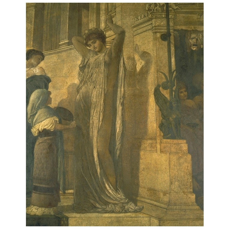 detail